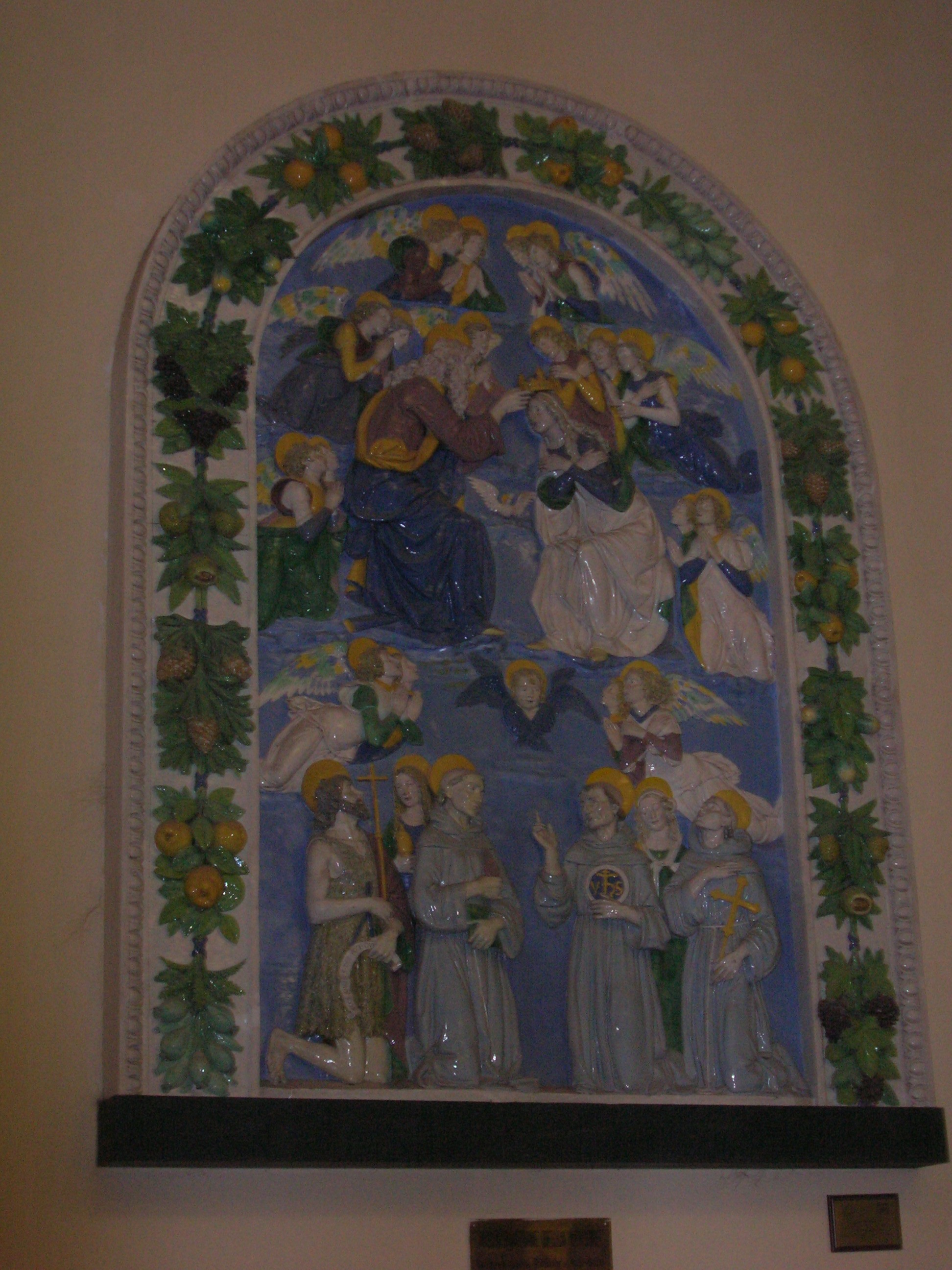 La Spezia - Chiesa Abbaziale di Santa Maria - Ancona robbiana